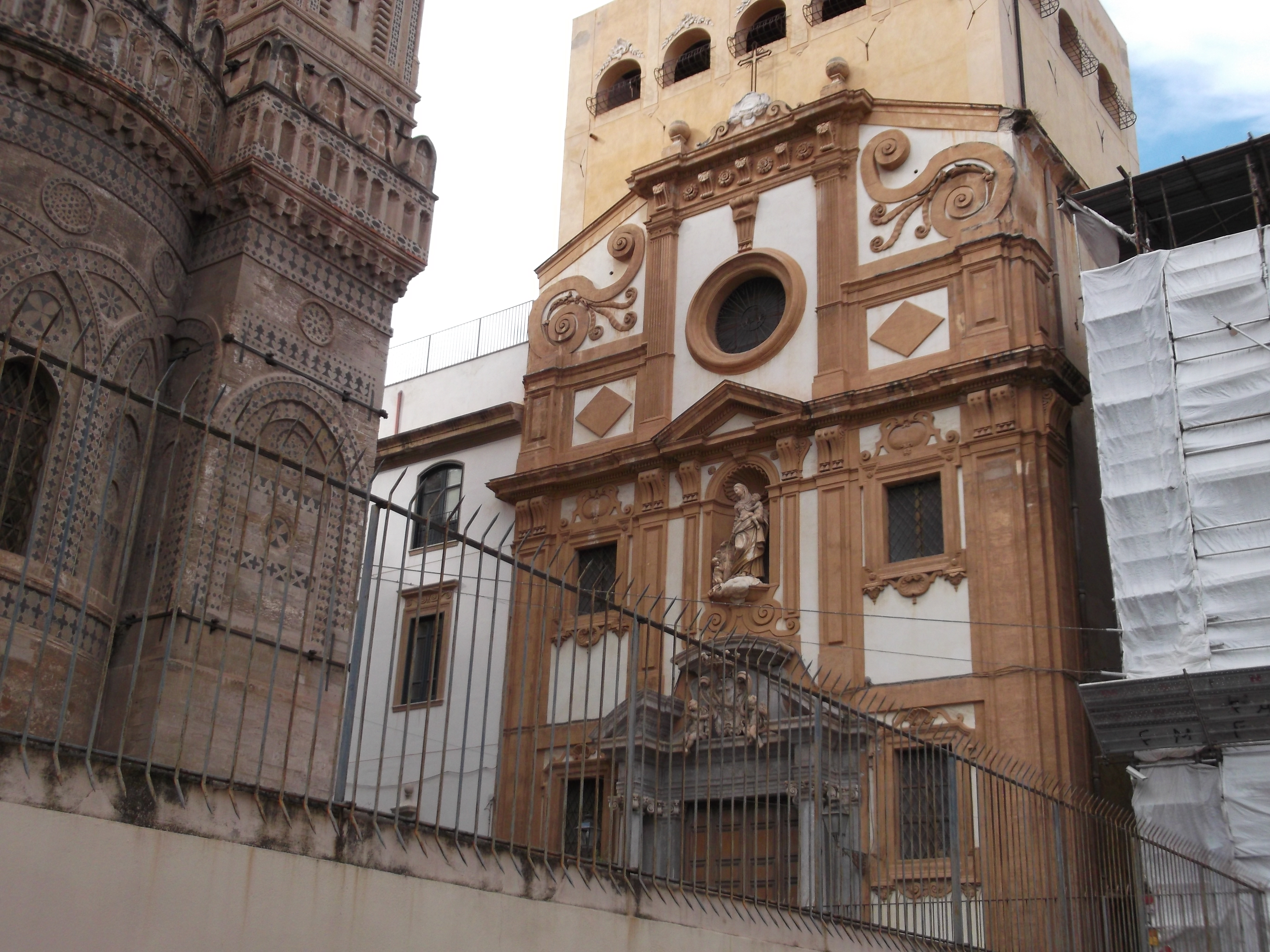 facciata